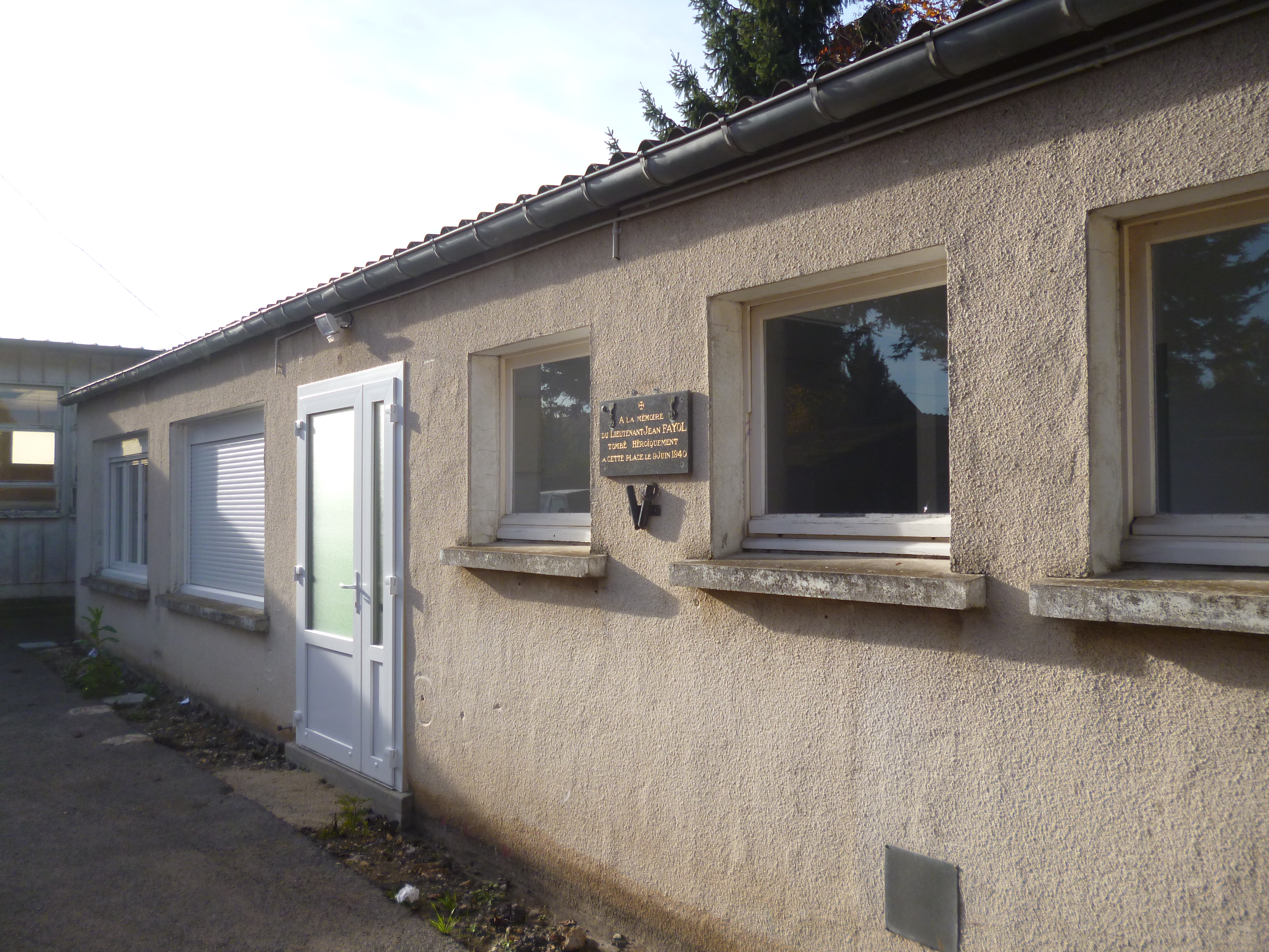 Plaque dédié à Jean Fayol, située sur la commune de Noyers-Saint-Martin (Oise).